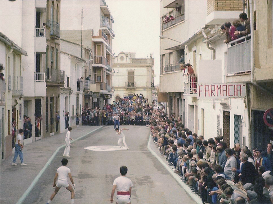 Carrer major